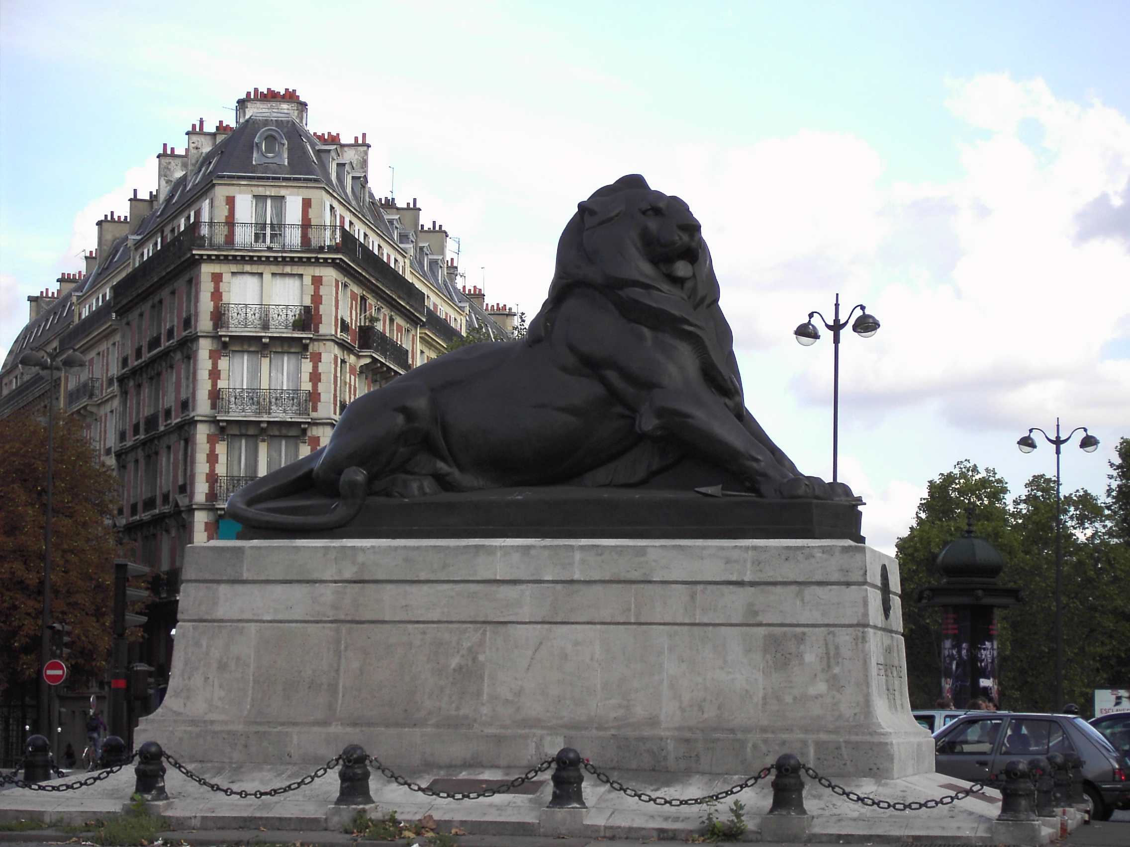 Paris, Place Denfert-Rochereau: le Lion de Belfort